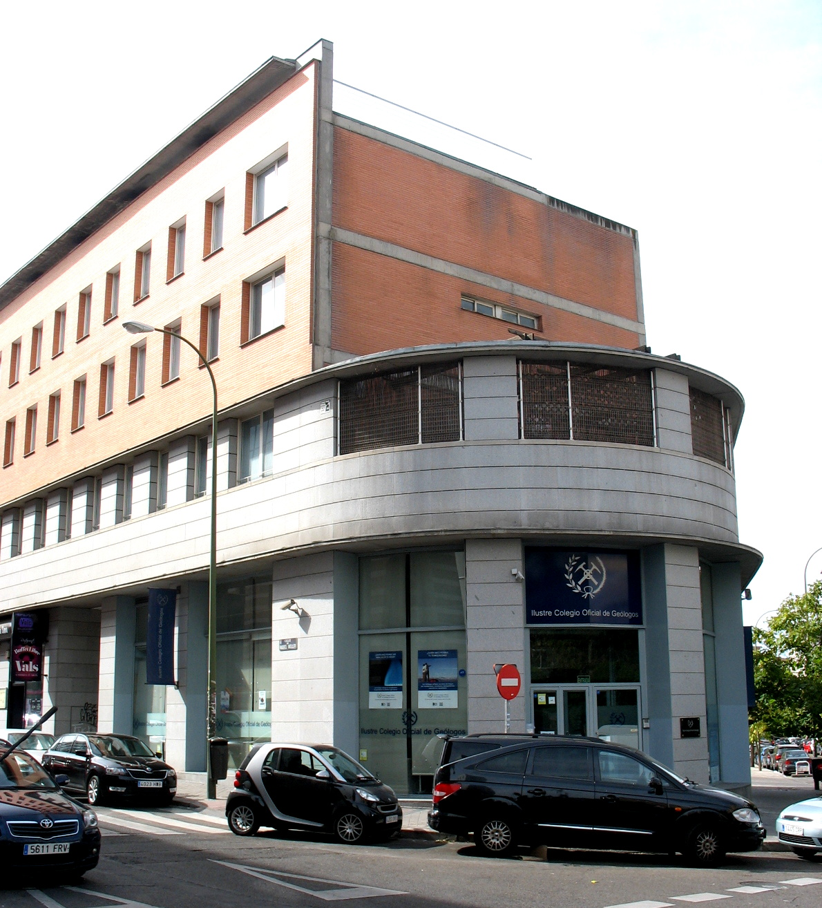 Sede del Ilustre Colegio Oficial de Geólogos. Calle de Raquel Meller, 7 (Local), Madrid, España.